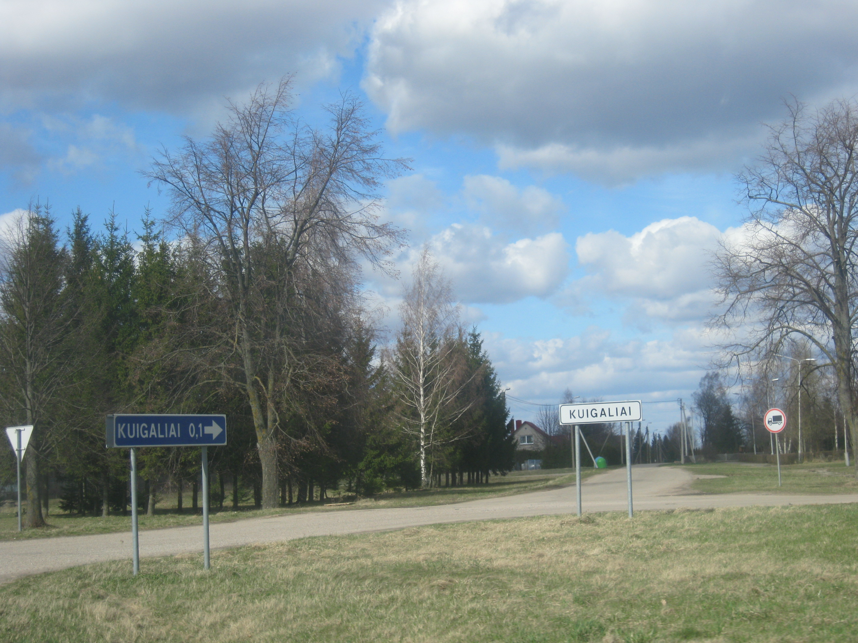 Kuigaliai